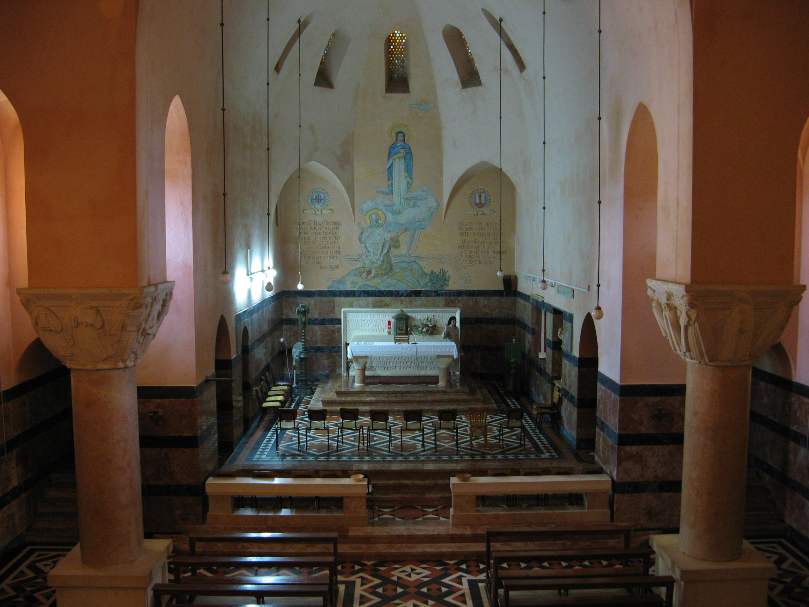 מנזר גבירתנו של הכרמל